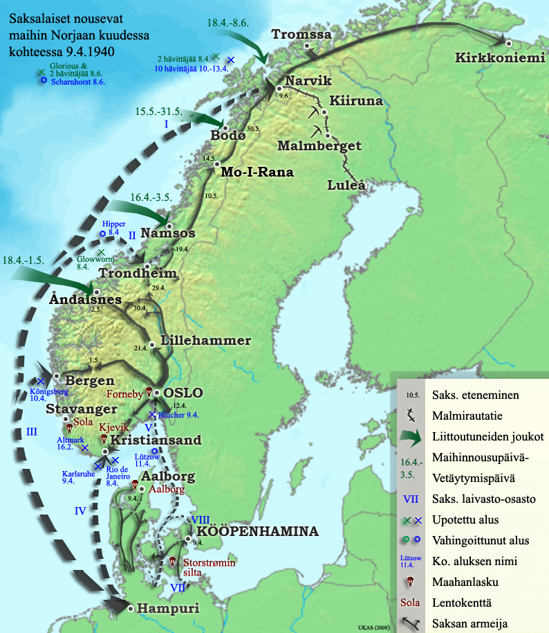 Taistelu Norjasta (Operaatio Weserübung). Tiedot kirjoista Chris Ellis: 7th Flieger Division; Chris Mann & Christer Jörgensen: Hitler's Arctic War